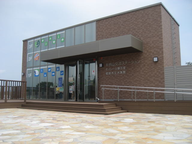 手柄山交流ステーション屋上出入口